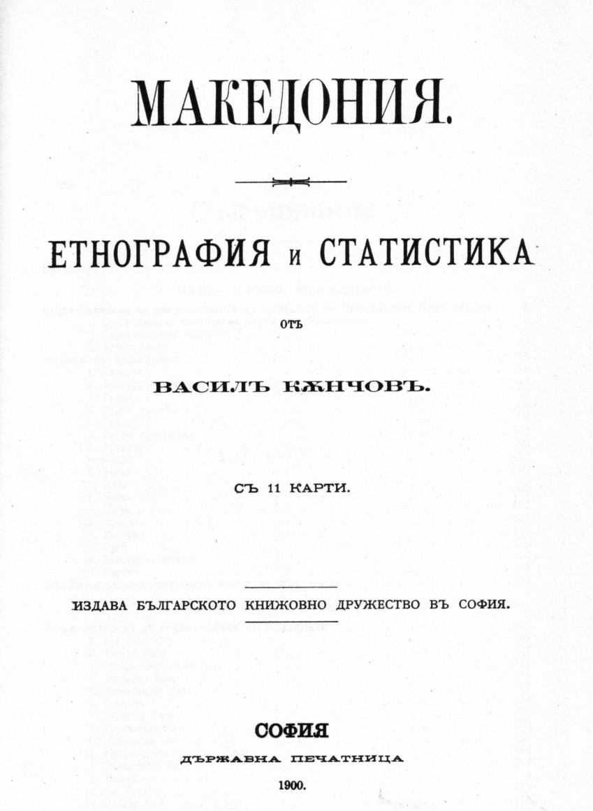 Корица на Македония. Етнография и статистика на Васил Кънчов.